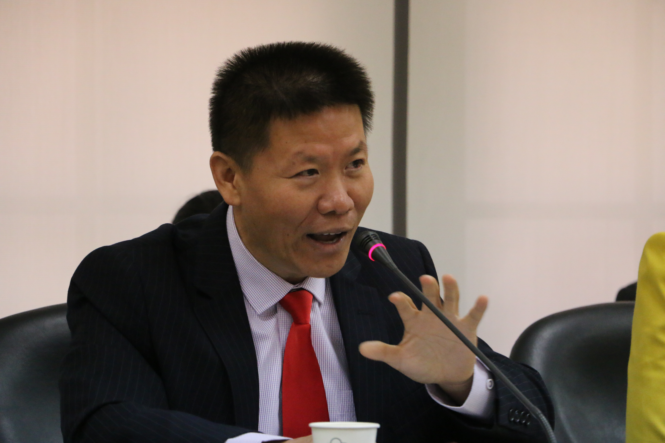 对华援助协会牧师傅希秋（美国之音杨明拍摄）